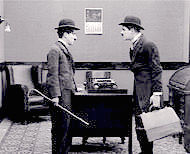 fotografía de la película Charlot jefe de tienda de 1916